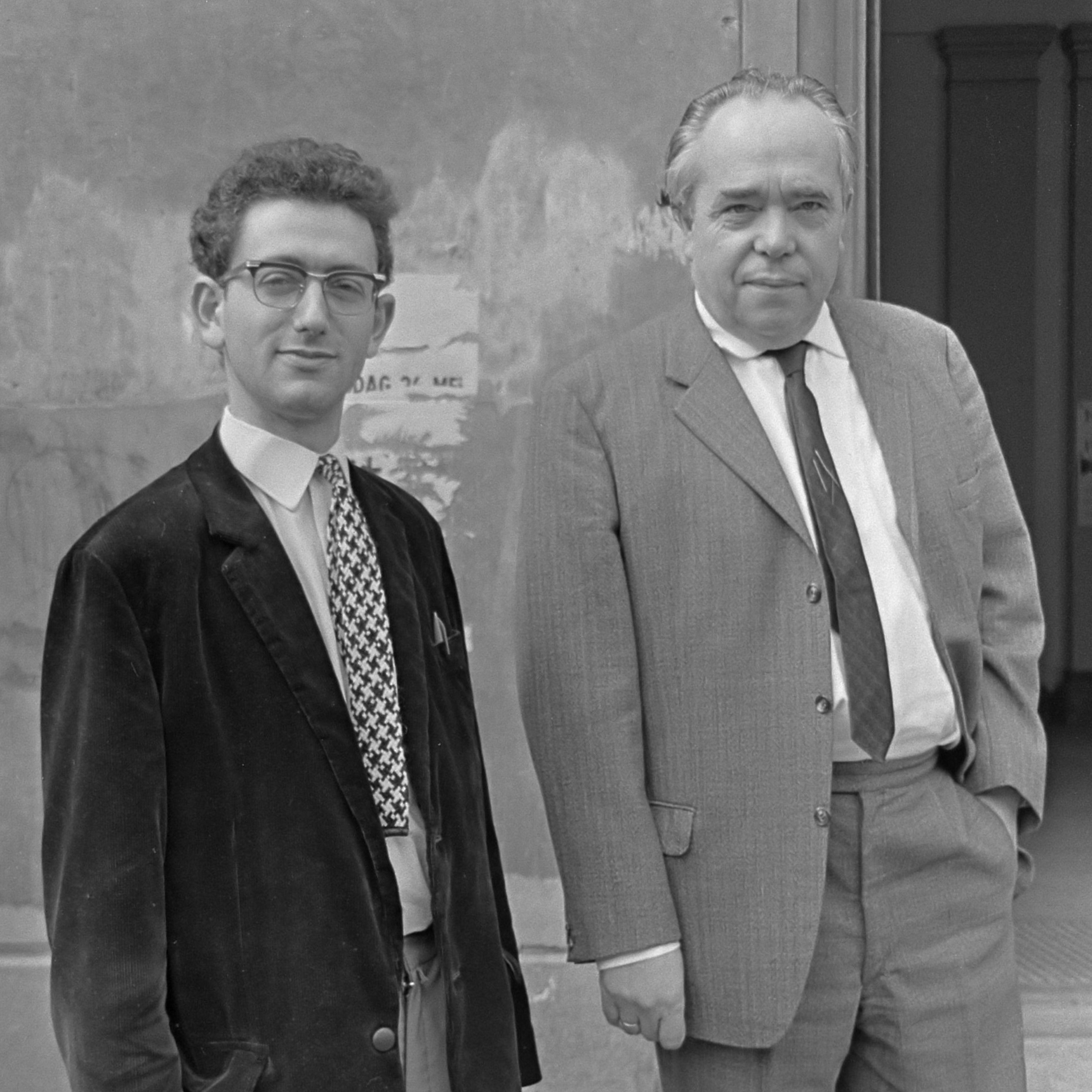 Journalist Martin van Amerongen in kort geding. Rechts naast hem de hoofdredacteur van Vrij Nederland Mathieu Smedts 3 juli 1967